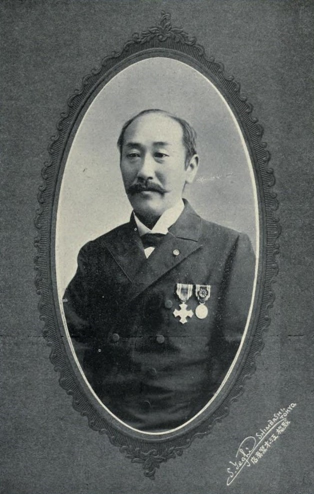 堀田正倫 1910